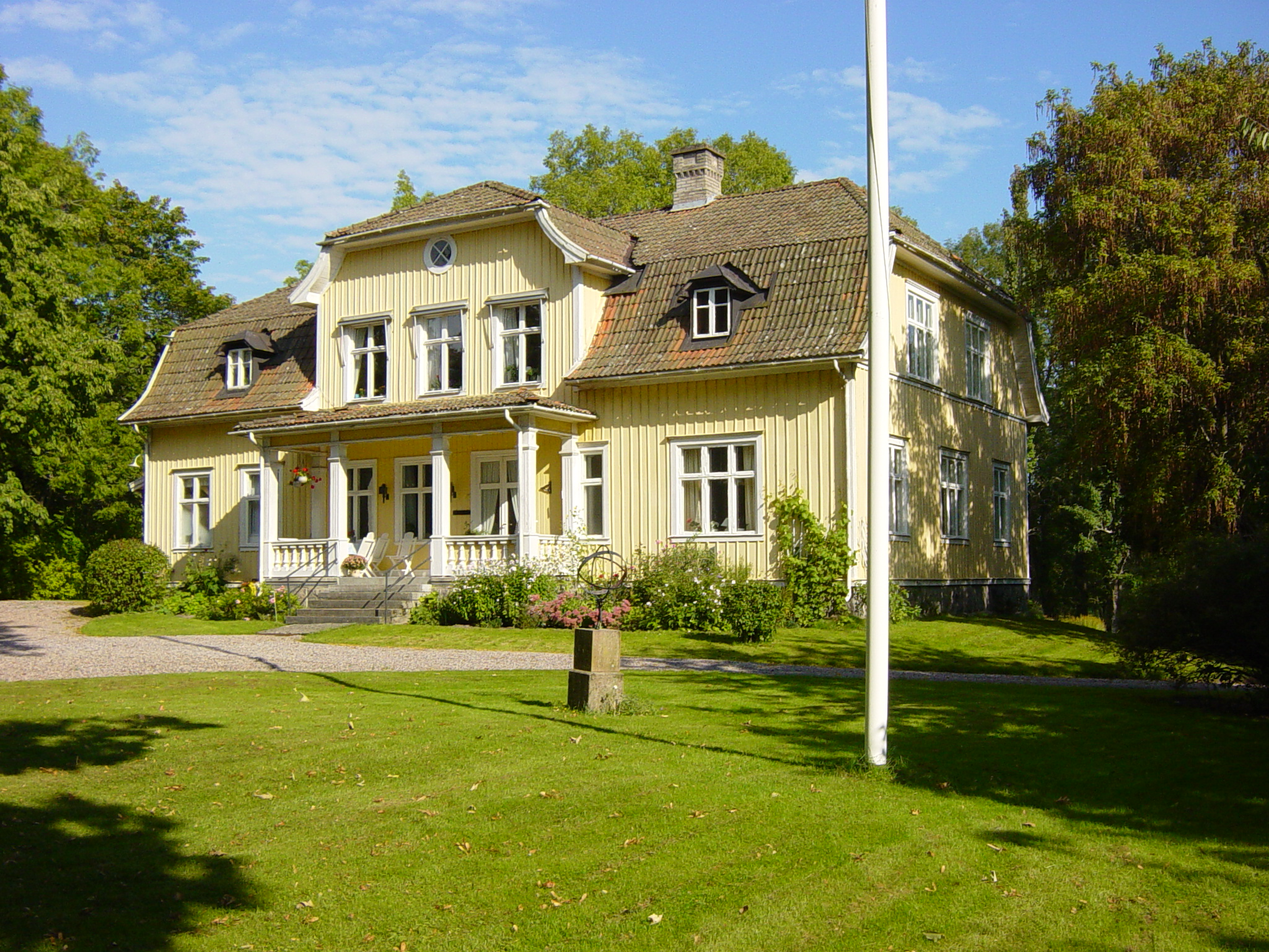 Bild på mangårdsbyggnadens framsida.